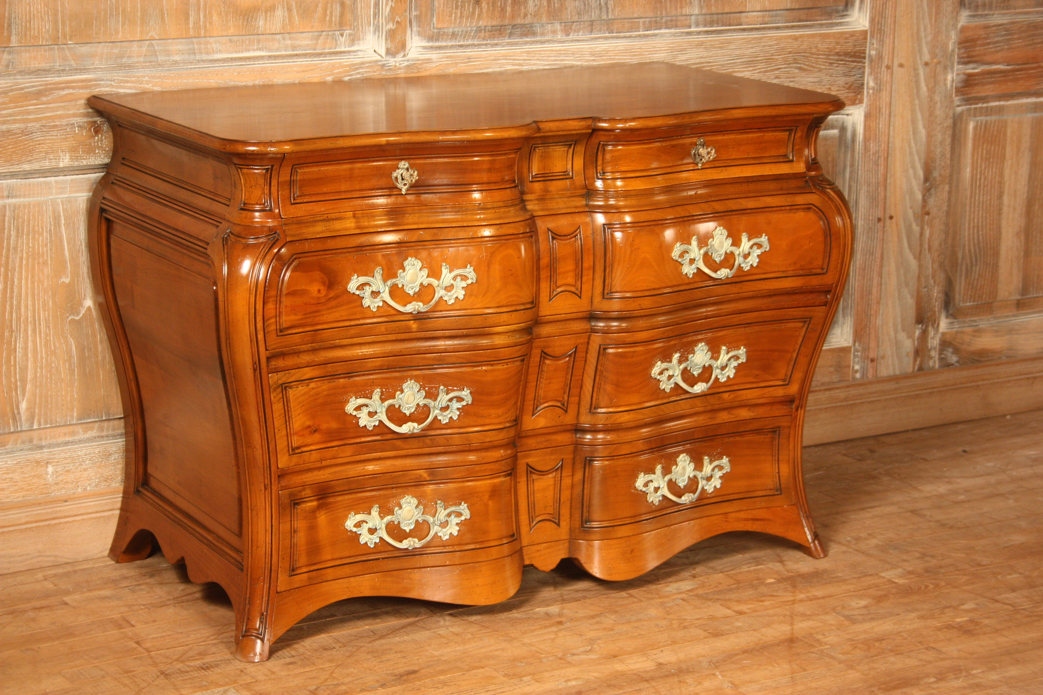 Commode de style Régence de type régionale Malouinière. Réalisée par les Ateliers Allot Frères.